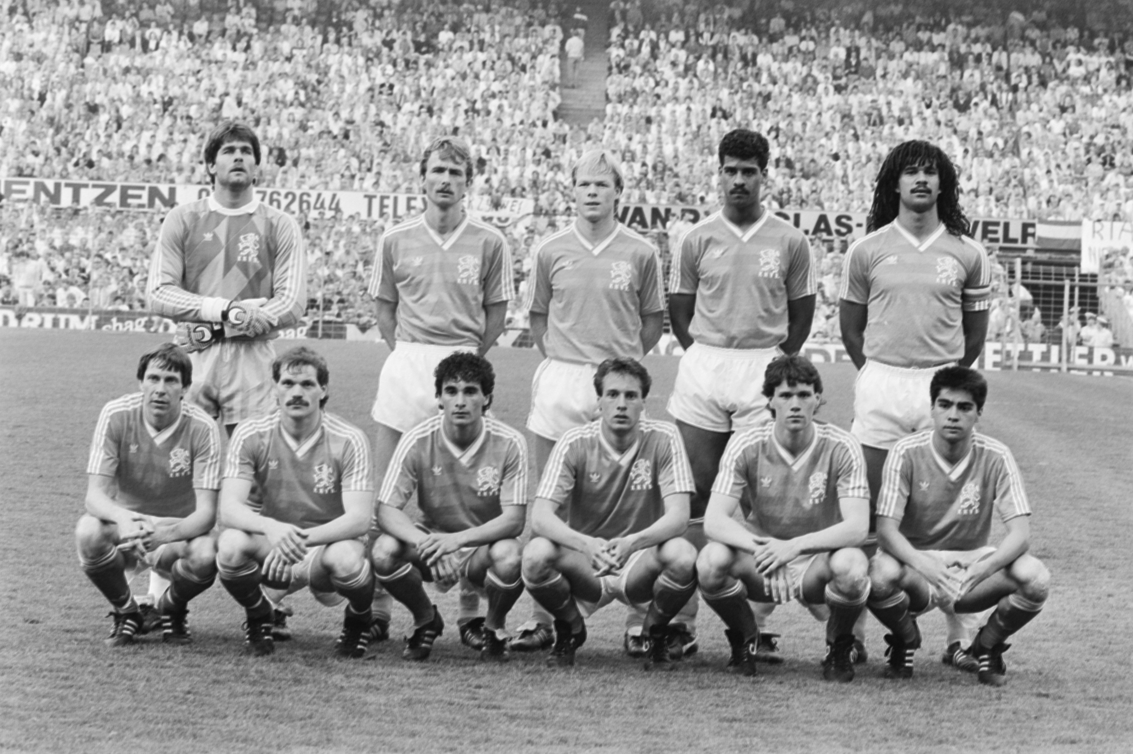 Collectie / Archief : Fotocollectie Anefo Reportage / Serie : [ onbekend ] Beschrijving : Nederland tegen Hongarije 2-0; het Nederlandse elftal vln (staand) Hiele, Van Tiggelen , Koeman, Rijkaard, Gullit, zittend vlnr A. Mühren , Wouters, Vanenburg, Van 't Schip, Van Basten, Silooy Datum : 29 april 1987 Locatie : Hongarije, Nederland Trefwoorden : elftallen, sport, voetbal Persoonsnaam : A. Muhren, Gullit, Hiele, Koeman, Rijkaard, Frank, Vanenburg, Gerald Fotograaf : Bogaerts, Rob / Anefo Auteursrechthebbende : Nationaal Archief Materiaalsoort : Negatief (zwart/wit) Nummer archiefinventaris : bekijk toegang 2.24.01.05 Bestanddeelnummer : 933-9664